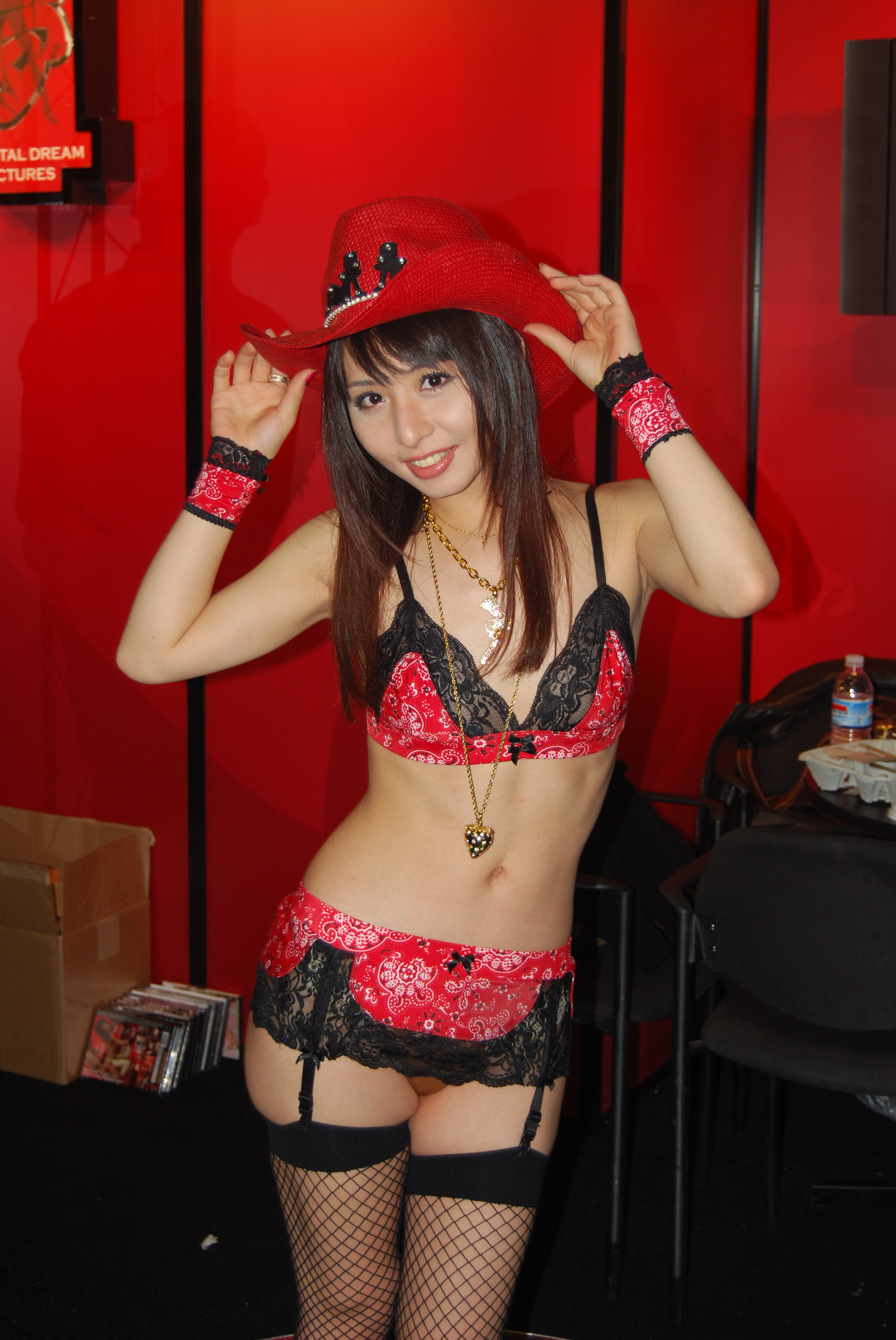 AEE2008_Nikon_Day2 284